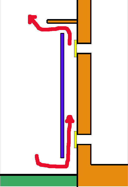 Esquema de funcionamiento muro trombe 4